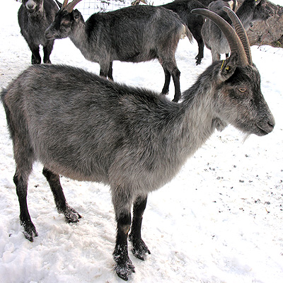 Graue Bergziege bzw. Capra Grigia, Projekt von ProSpecieRara